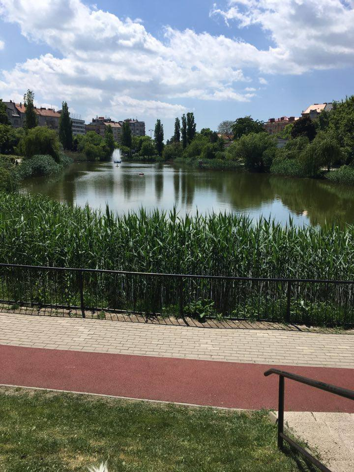 A Feneketlen-tó